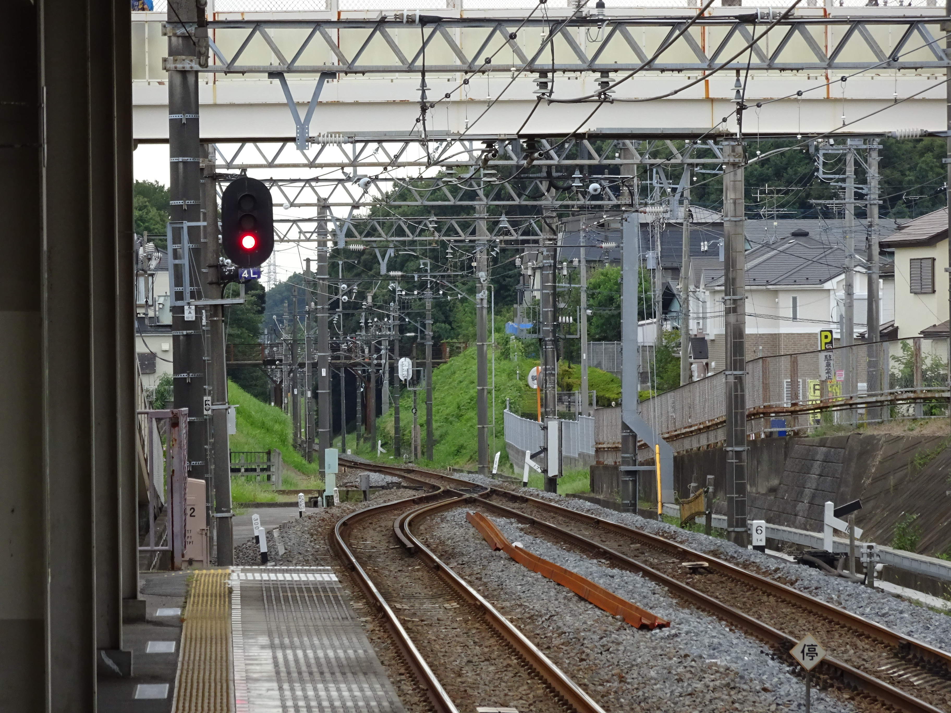 逆井駅船橋方にあるポイント。単線区間となる